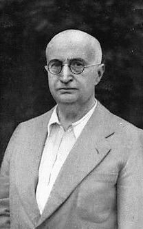 Massimo Lenchantin de Gubernatis